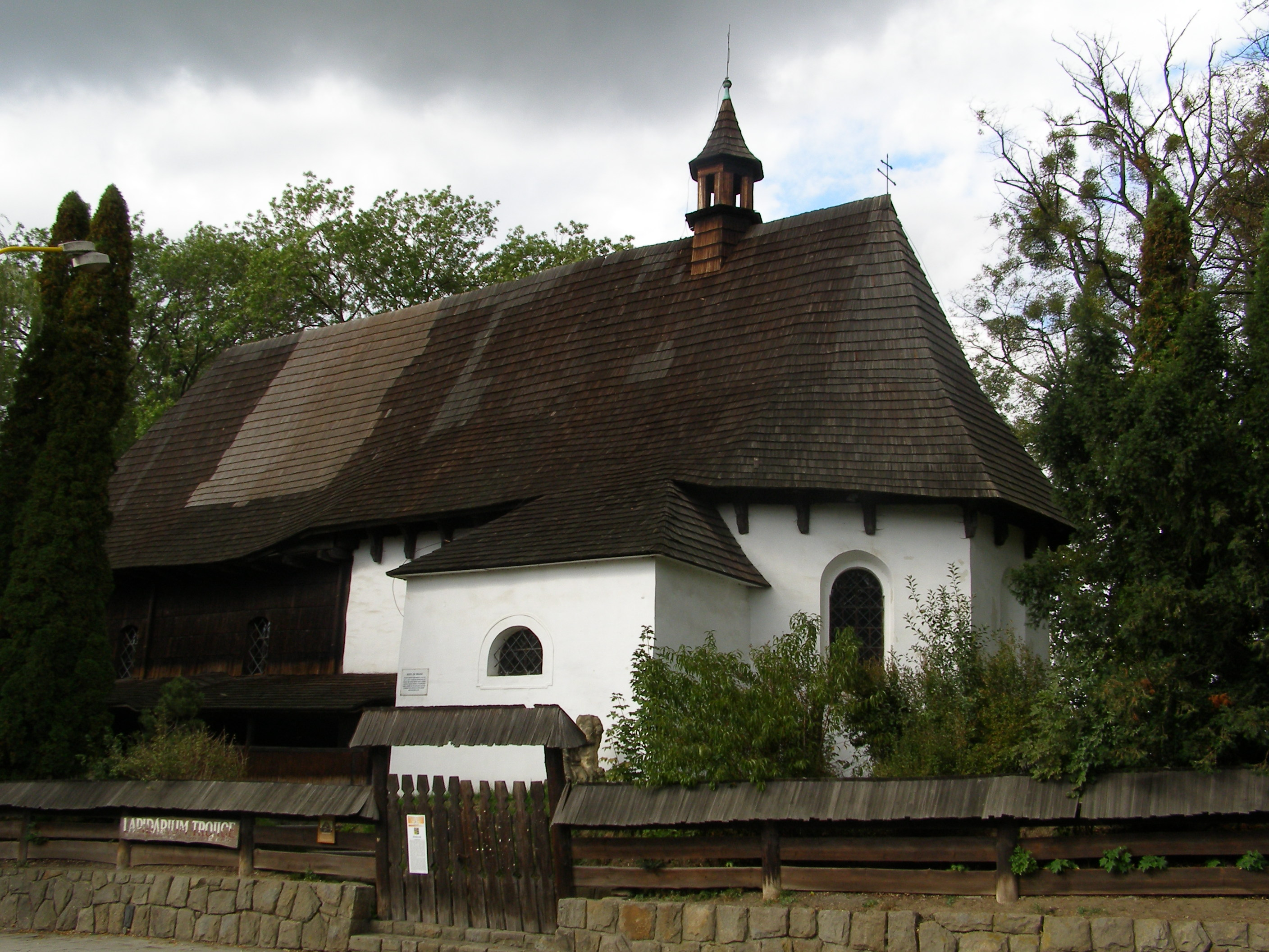 Kostel Nejsvětější Trojice (Valašské Meziříčí), Valašské Meziříčí